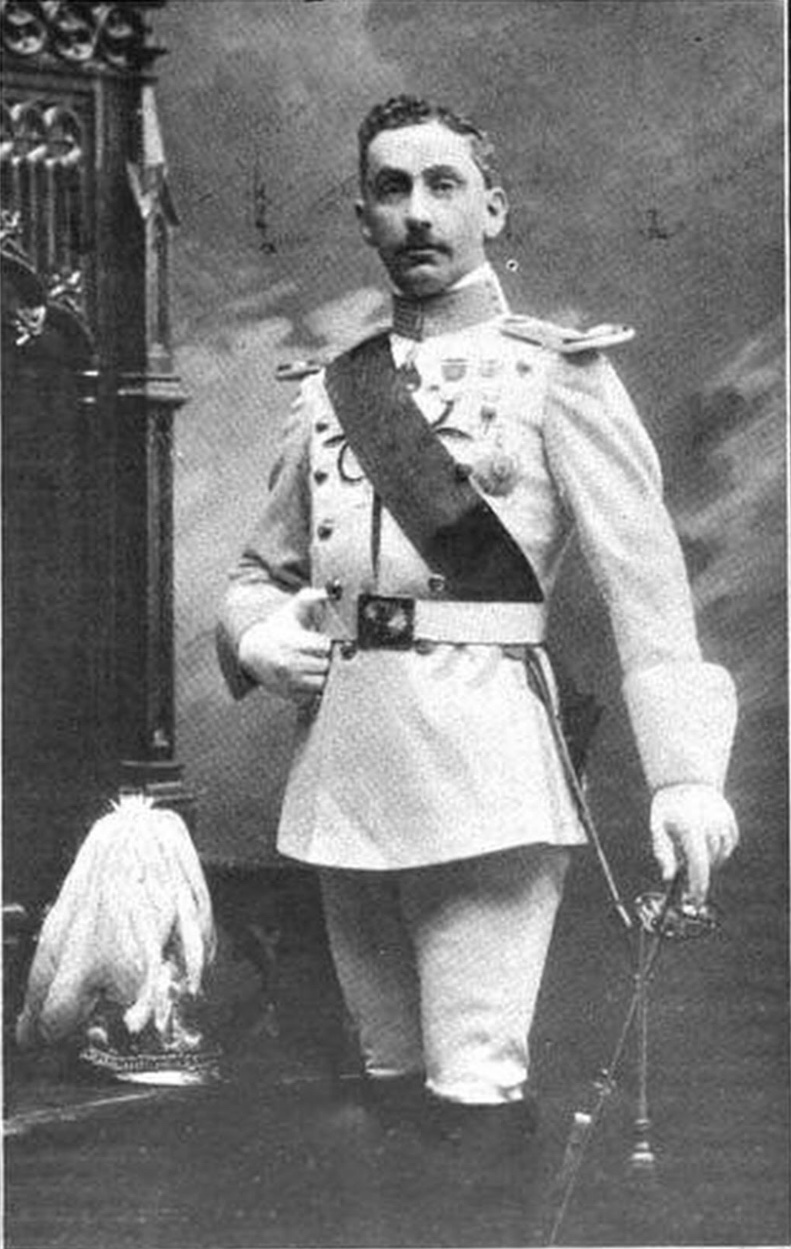 Retrato de D. Joaquin de Arteaga, XVIII marqués de Santillana (1909)